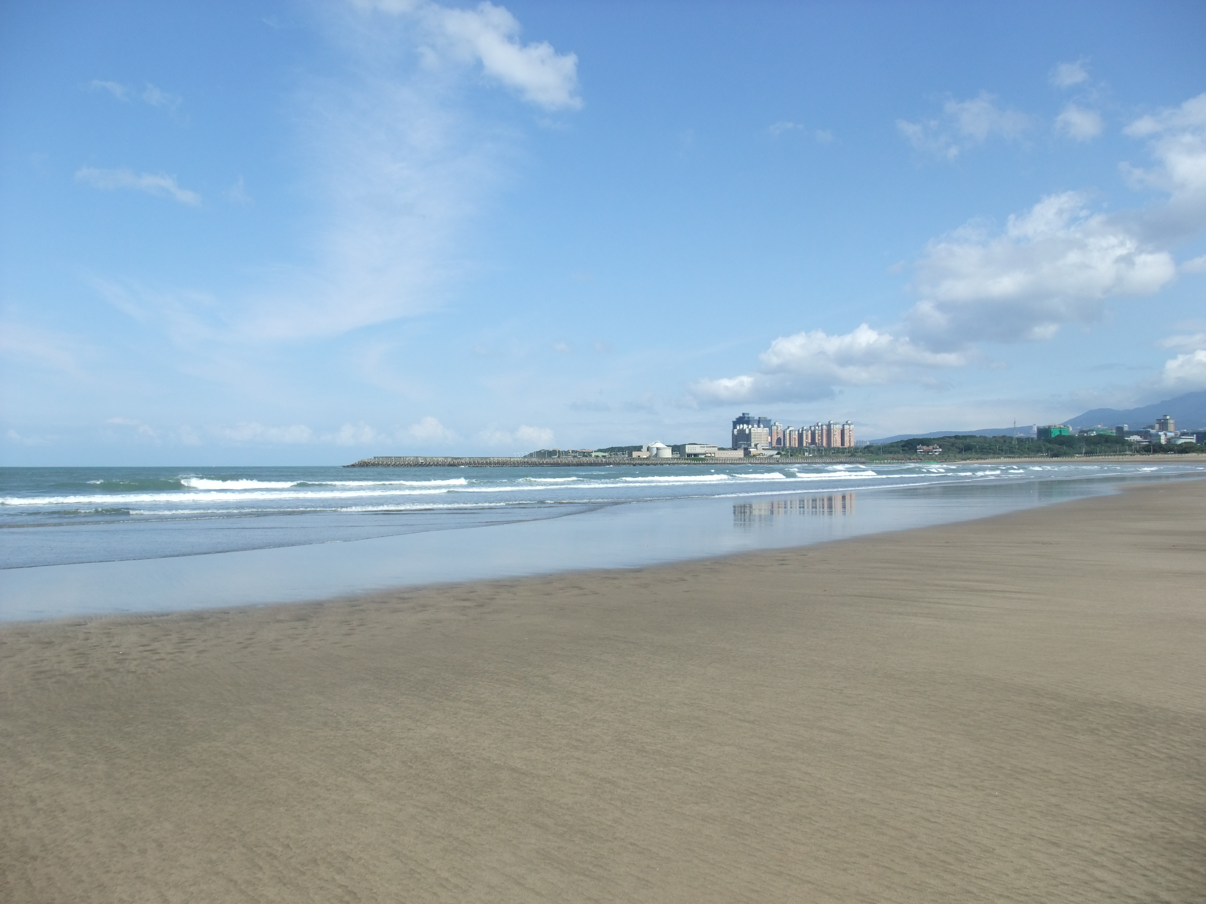 中文（台灣）: 沙崙海水浴場與淡水新市鎮